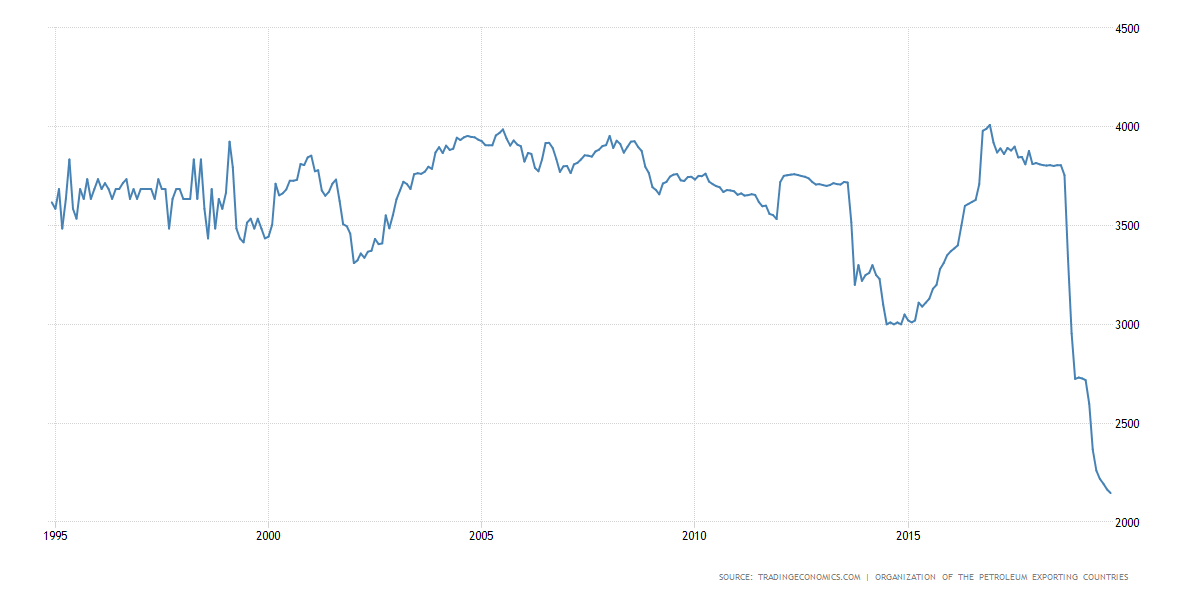 تولید نفت ایران